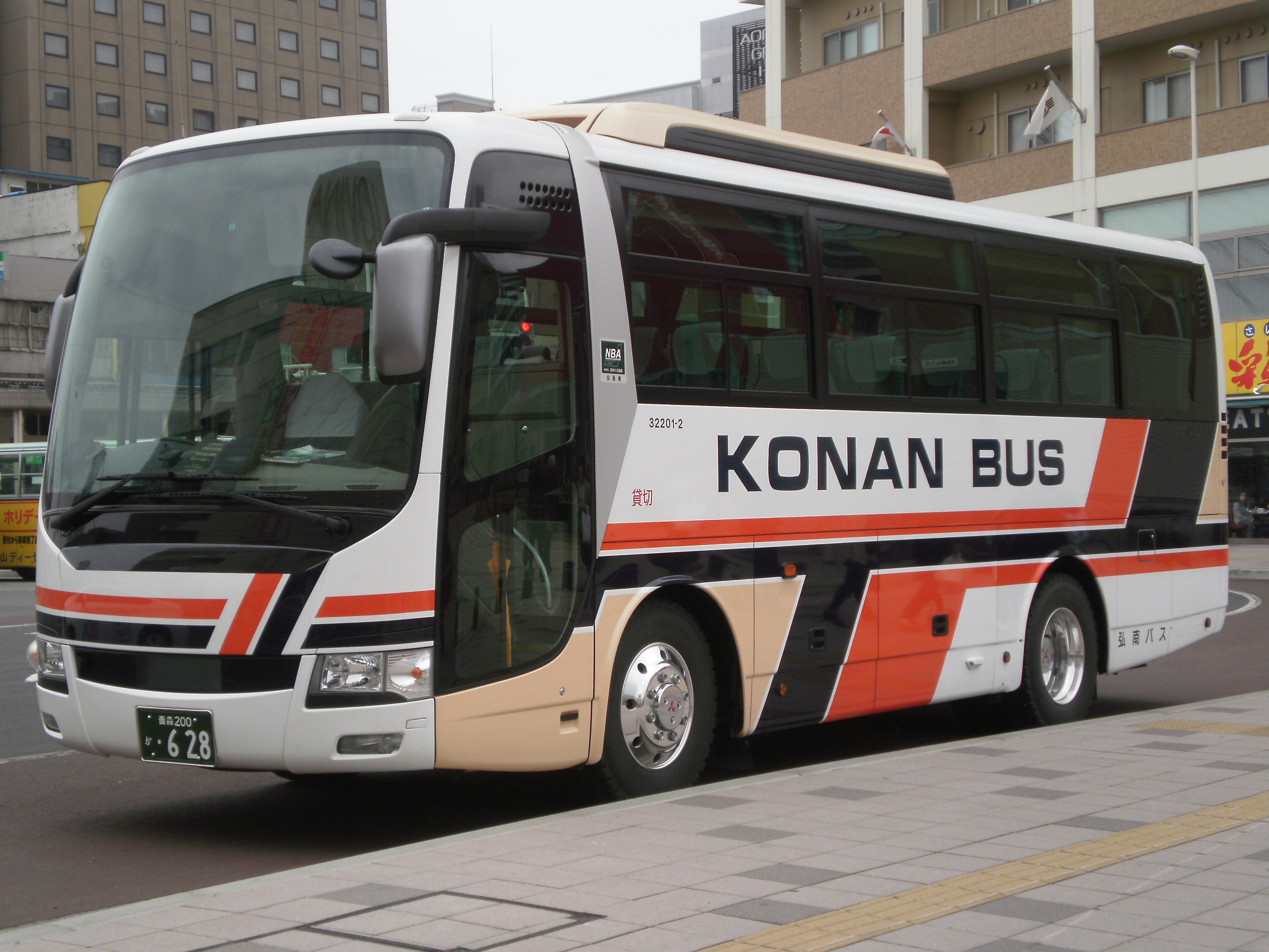 弘南バス観光貸切塗装（三菱ふそう・エアロエース ショートタイプMM：PDG-MM96FH、社番：32201-2）